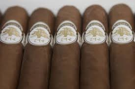 Puro, Tabacco, Cigarro